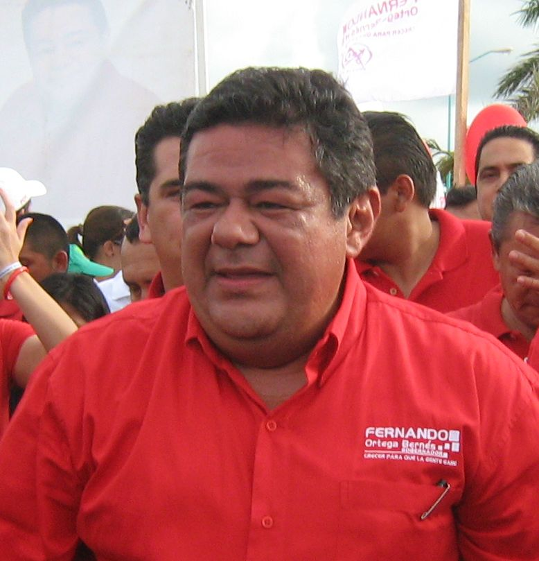 Fernando Ortega Bernés en su cierre de campaña en la ciudad de Campeche.